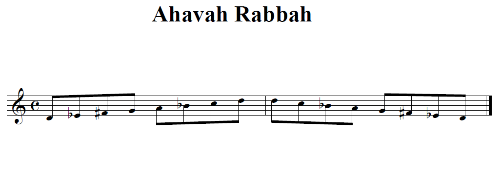 basic ahavah rabbah scale